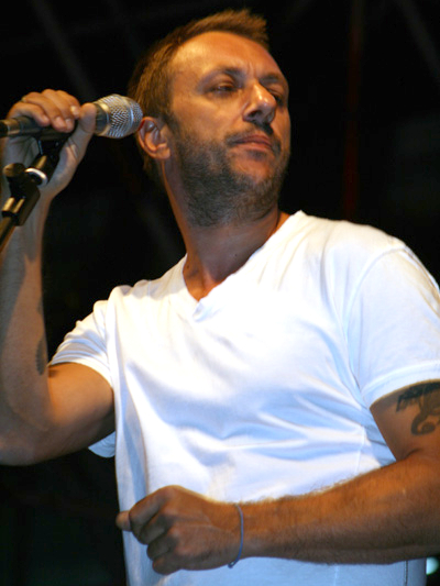 Neffa